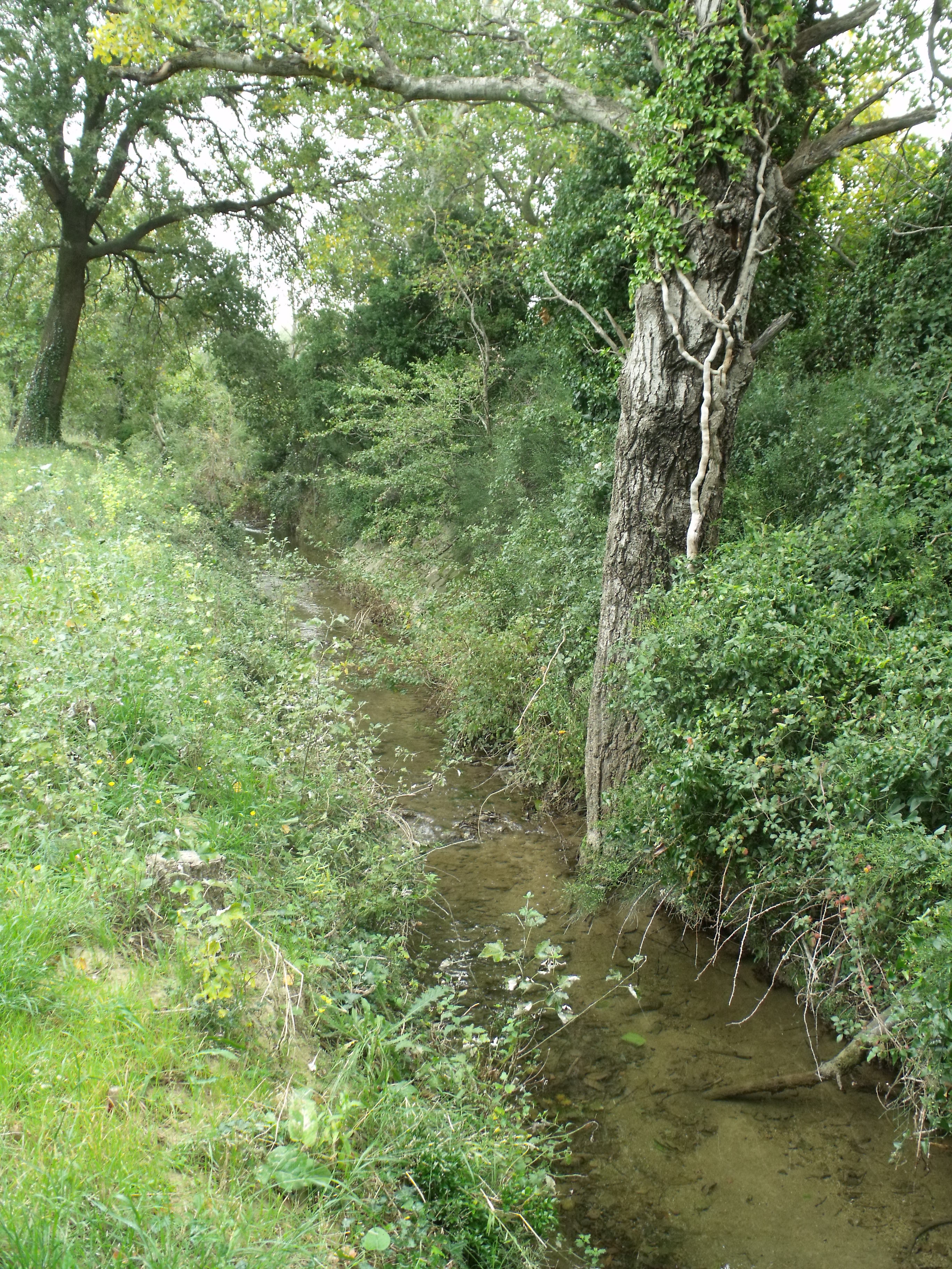 Gaudre du Destet, sur le territoire de la commune de Mouriès (Bouches-du-Rhône).